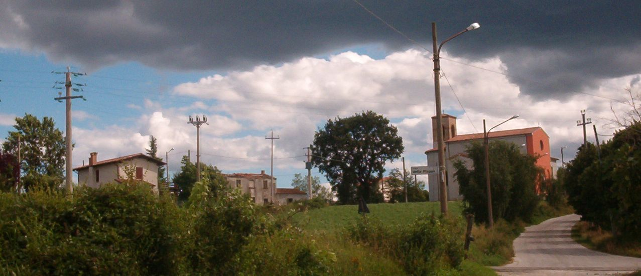 L'abitato di Poggio Sant'Ercolano e la chiesa